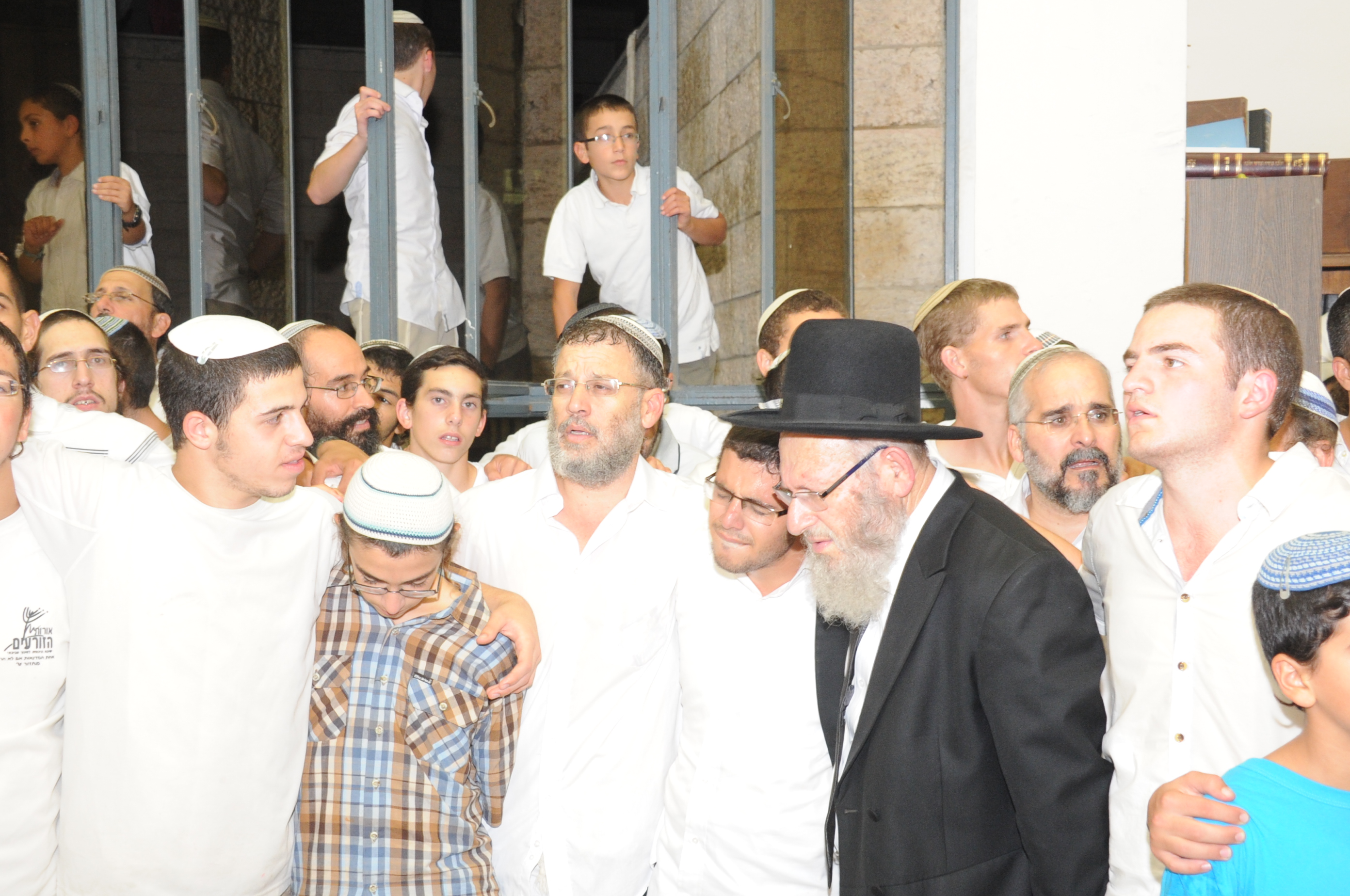 הרב בנימין בארי בישיבת מרכז הרב